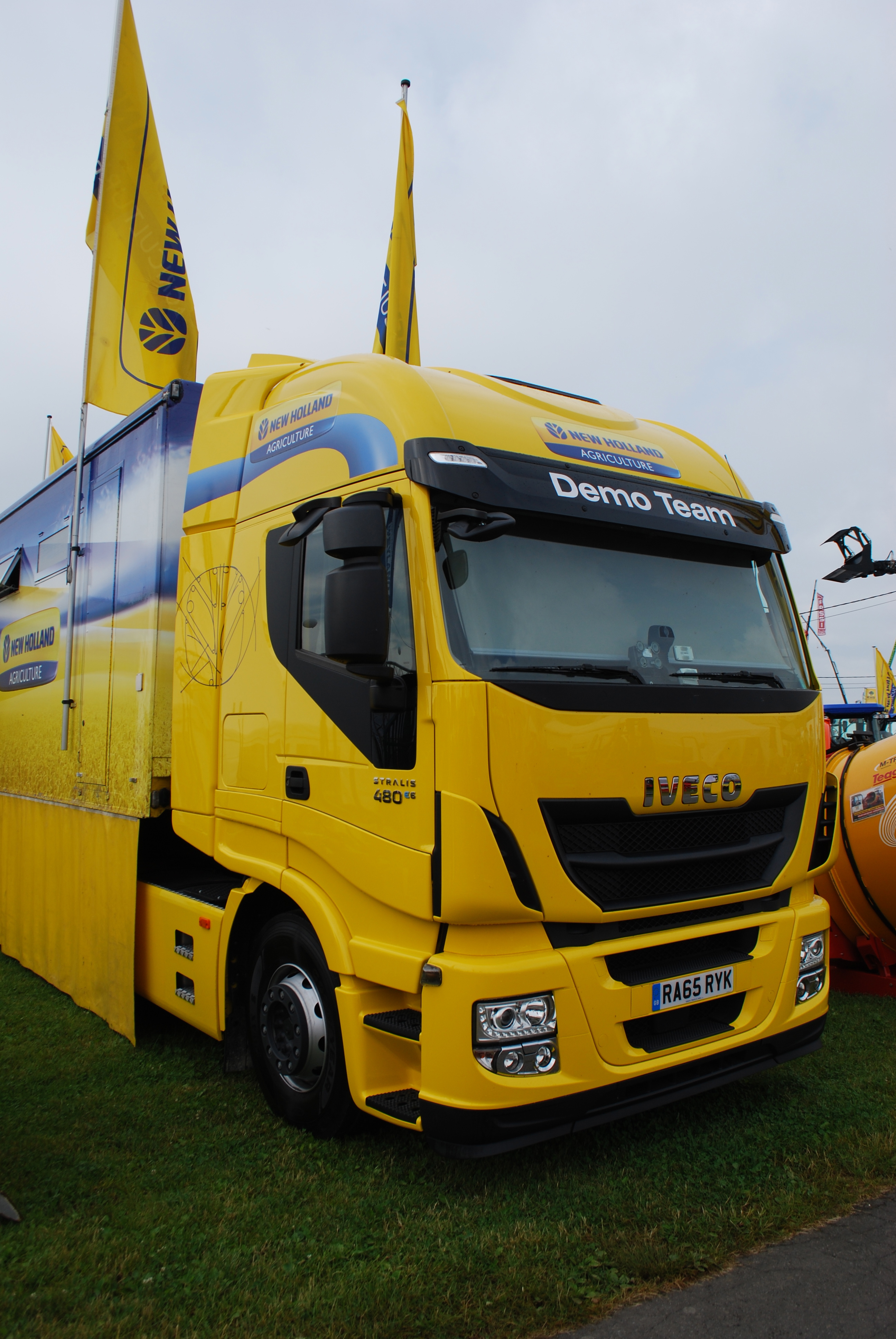 Vue de la Foire agricole de Libramont, dans le Luxembourg belge (82e édition en 2016).